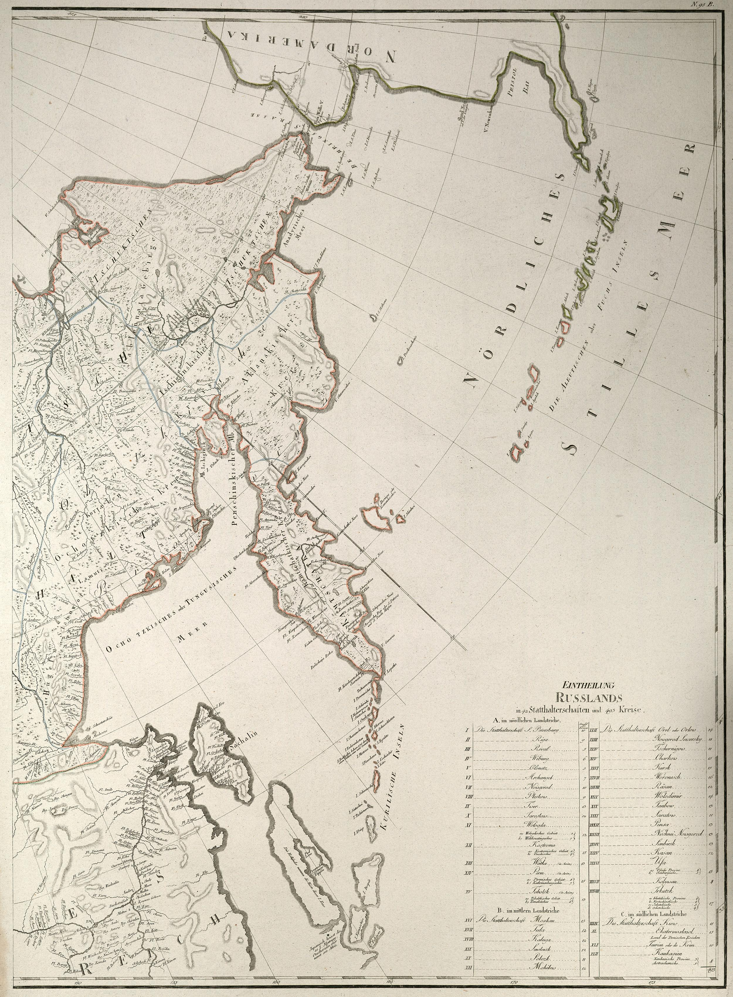 Generalkarte des Russischen Reichs mit der Eintheilung in die neu errichteten Statthalterschaften und Kreise